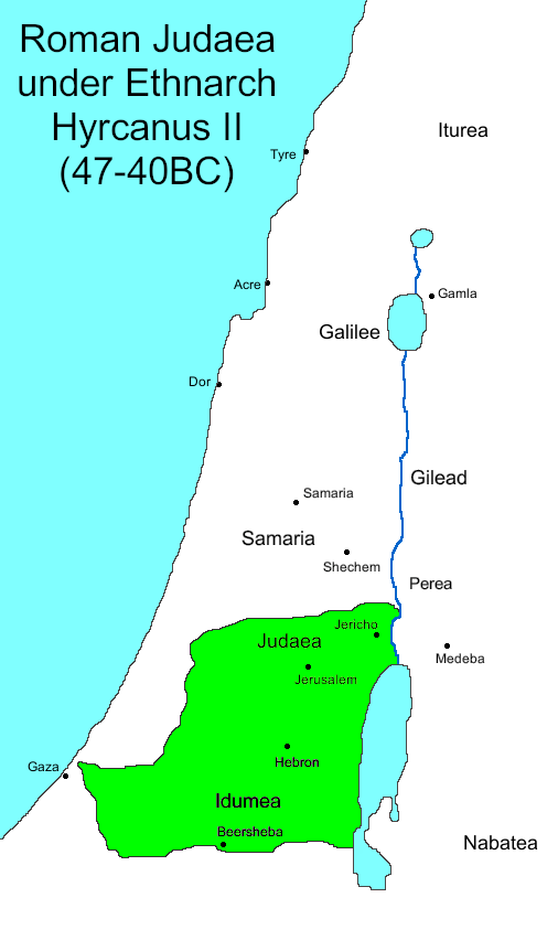 Categorie:Kaart Categorie:Afbeelding oudheid (Original text: Judea tussen 63 en 37 v.Chr.)